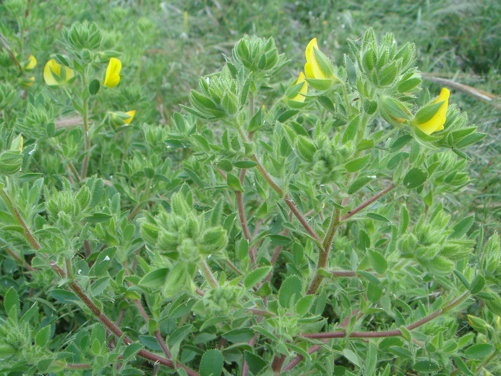 Ononis pubescens, Almonaster, Huelva, España